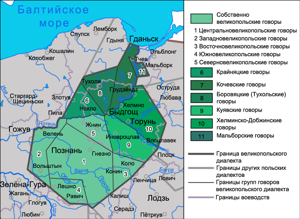 Карта распространения говоров великопольского диалекта. На основе карты С Урбанчика (без любавских, острудских и варминских говоров): Urbańczyk S. Zarys dialektologii polskiej. Wydanie trzecie. Warszawa, 1968 Gwary polskie. Przewodnik multimedialny pod redakcją Haliny Karaś. Zasięg i podziały dialektu wielkopolskiego